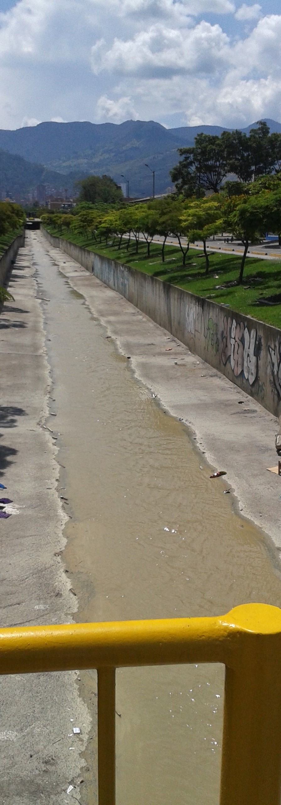 Quebrada Altavista, Medellín